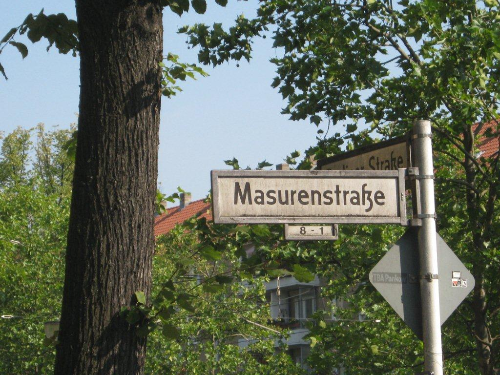 Straßenschild "Masurenstraße" in Berlin-Pankow; Referenz des Bürgermeisters Wilhelm Kuhr an Masuren und das Corps Masovia